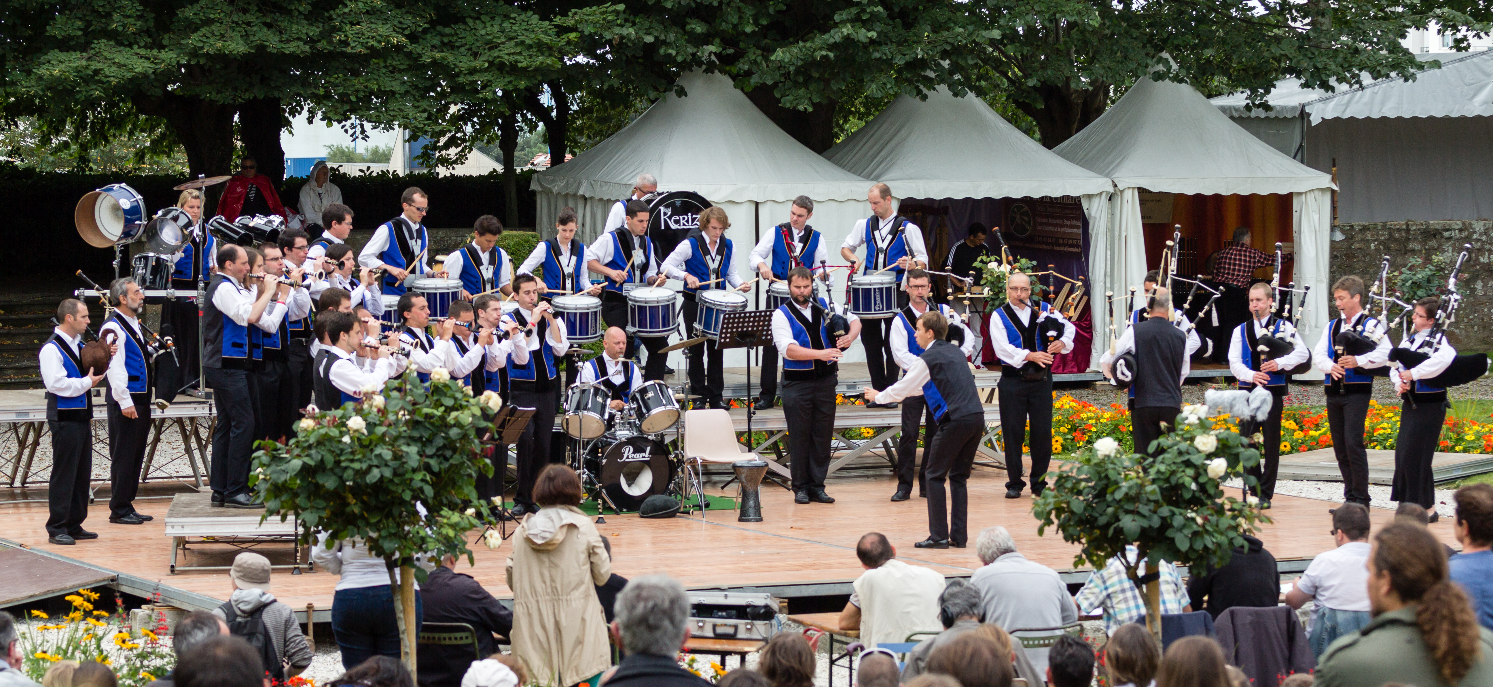 Le bagad Keriz lors du championnat national des bagadoù (deuxième catégorie) au FIL 2012.